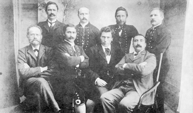 Føroyskt: Tingmanning Sjálvstýrisfloksins 1906. Aftan frá vinstru: Jóhan Hendrik Poulsen (Skopun), Símun Pauli Konoy (Gøtu), Jóhan M. Hentze (Sandi), Mads Andrias Winther (Tórshavn). Framman frá vinstru: Dánjal Pauli Michelsen (Miðvági), Jóannes Patursson (Kirkjubø), Símun av Skarði, (Føgrulíð, Klaksvík), Zacharias Nielsen (Sandavági).